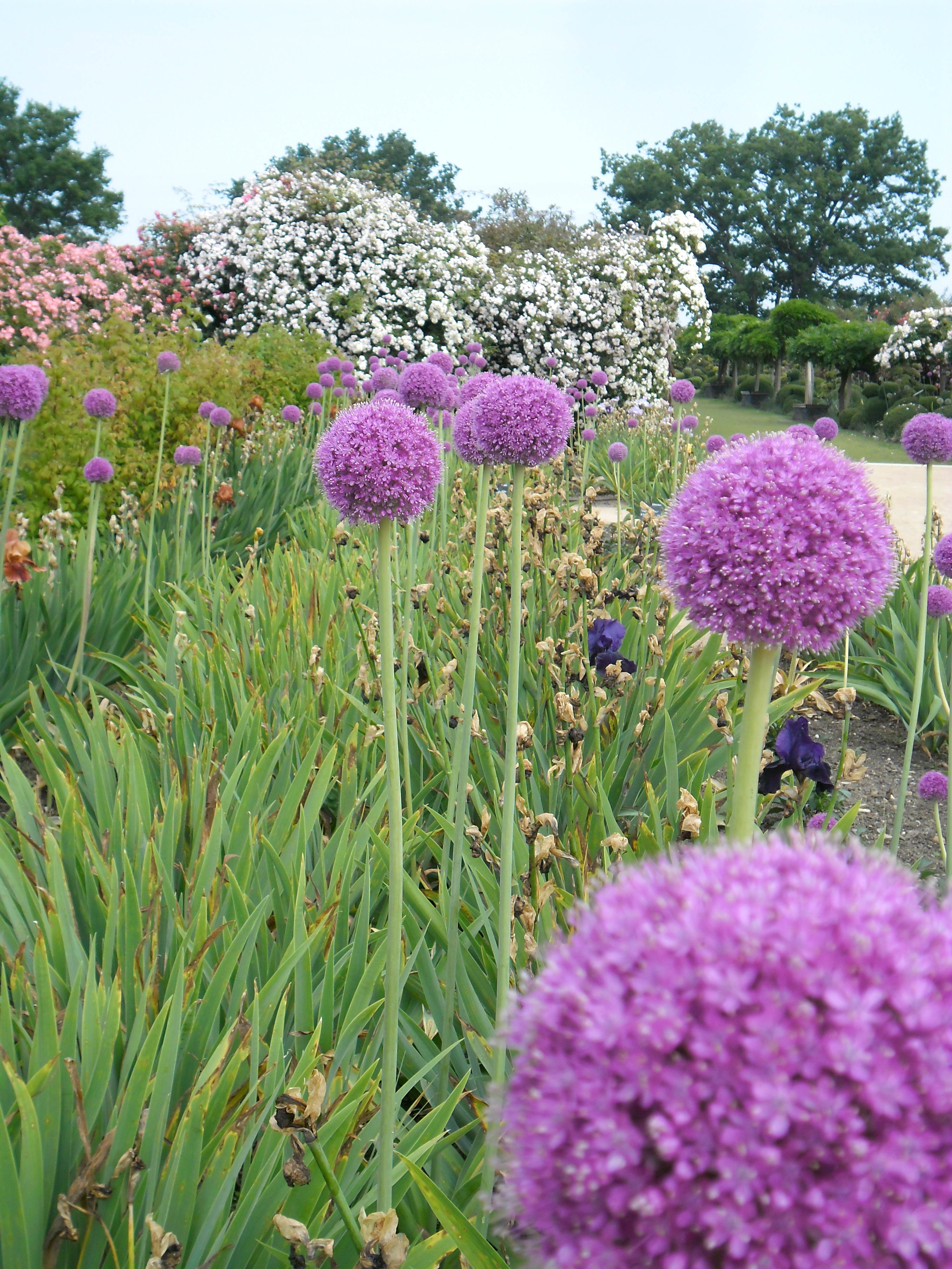 Allium giganteum Reg. (ail géant de l'Himalaya, oignon géant)